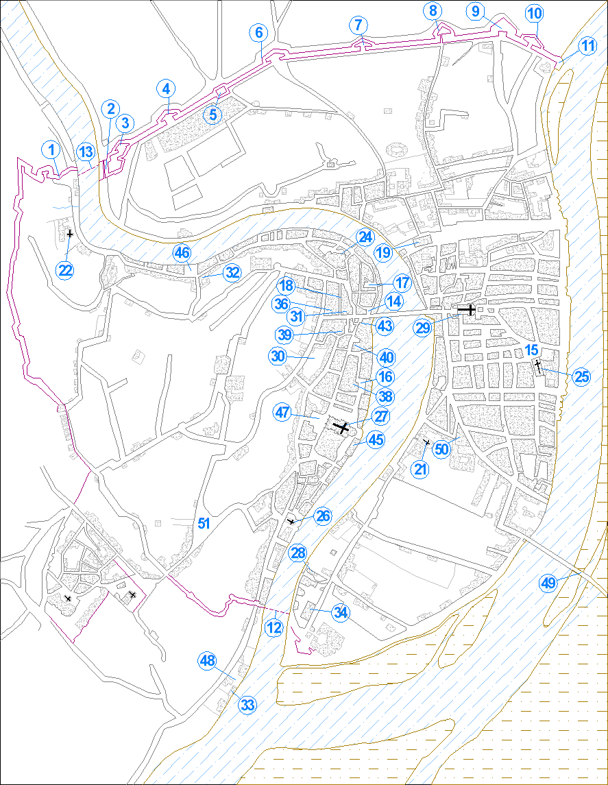 Plan de Lyon entre 1351 et 1562, reconstitué d'après sources documentaires.